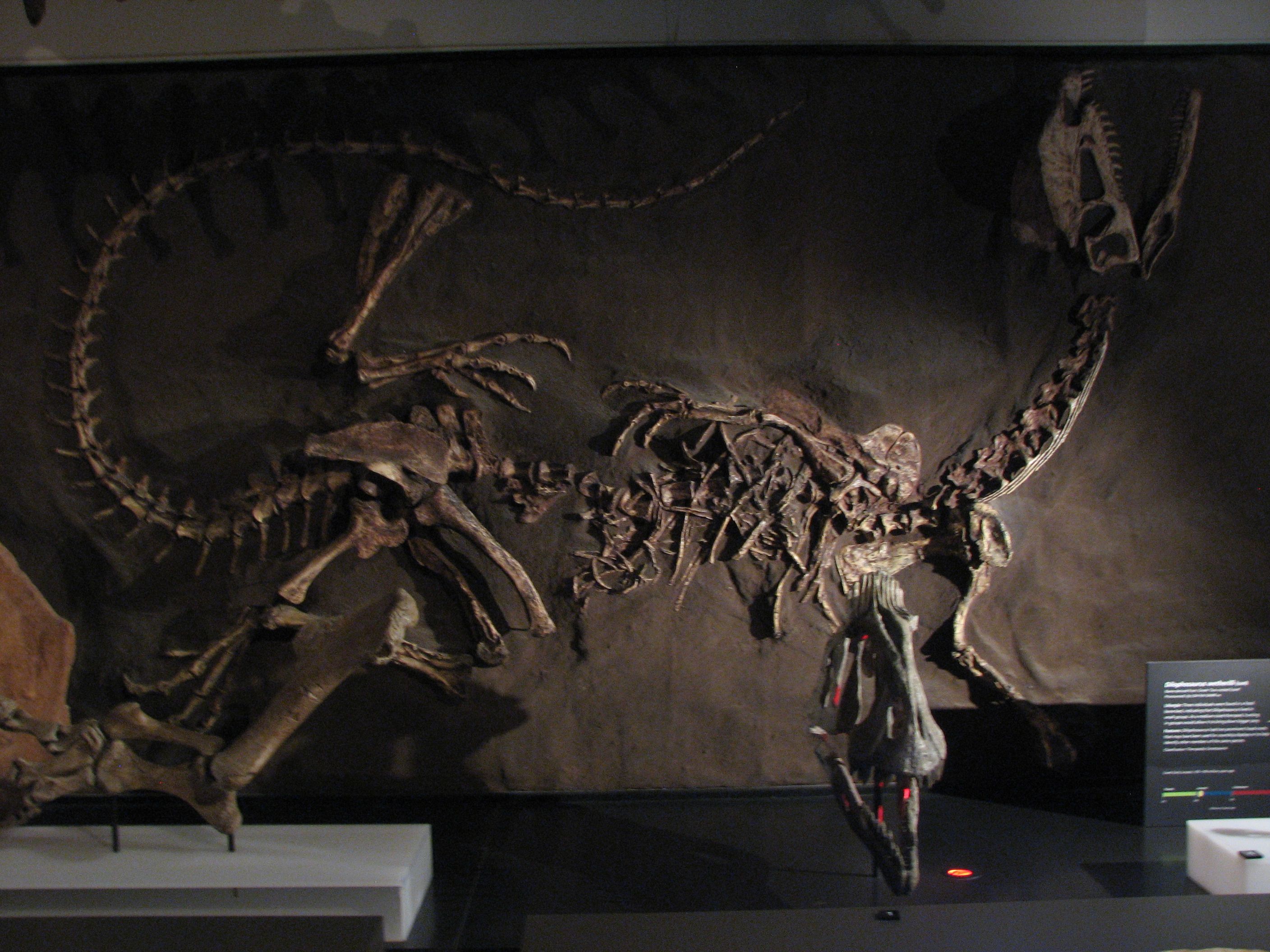 Dinosaurs!